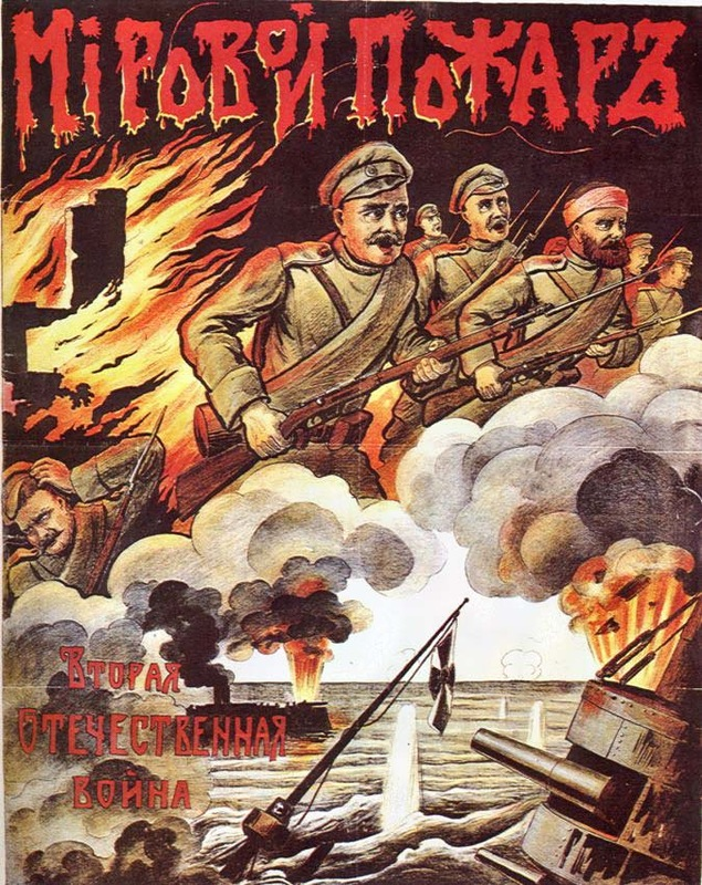 Вторая Отечественная война. 1914-1917 гг.. Плакат